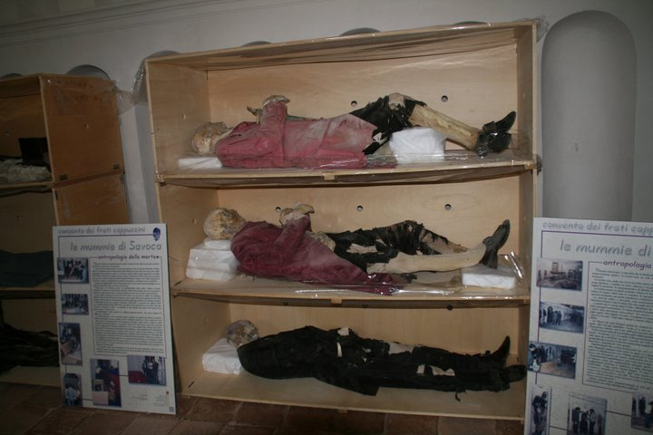 Mummie di Savoca